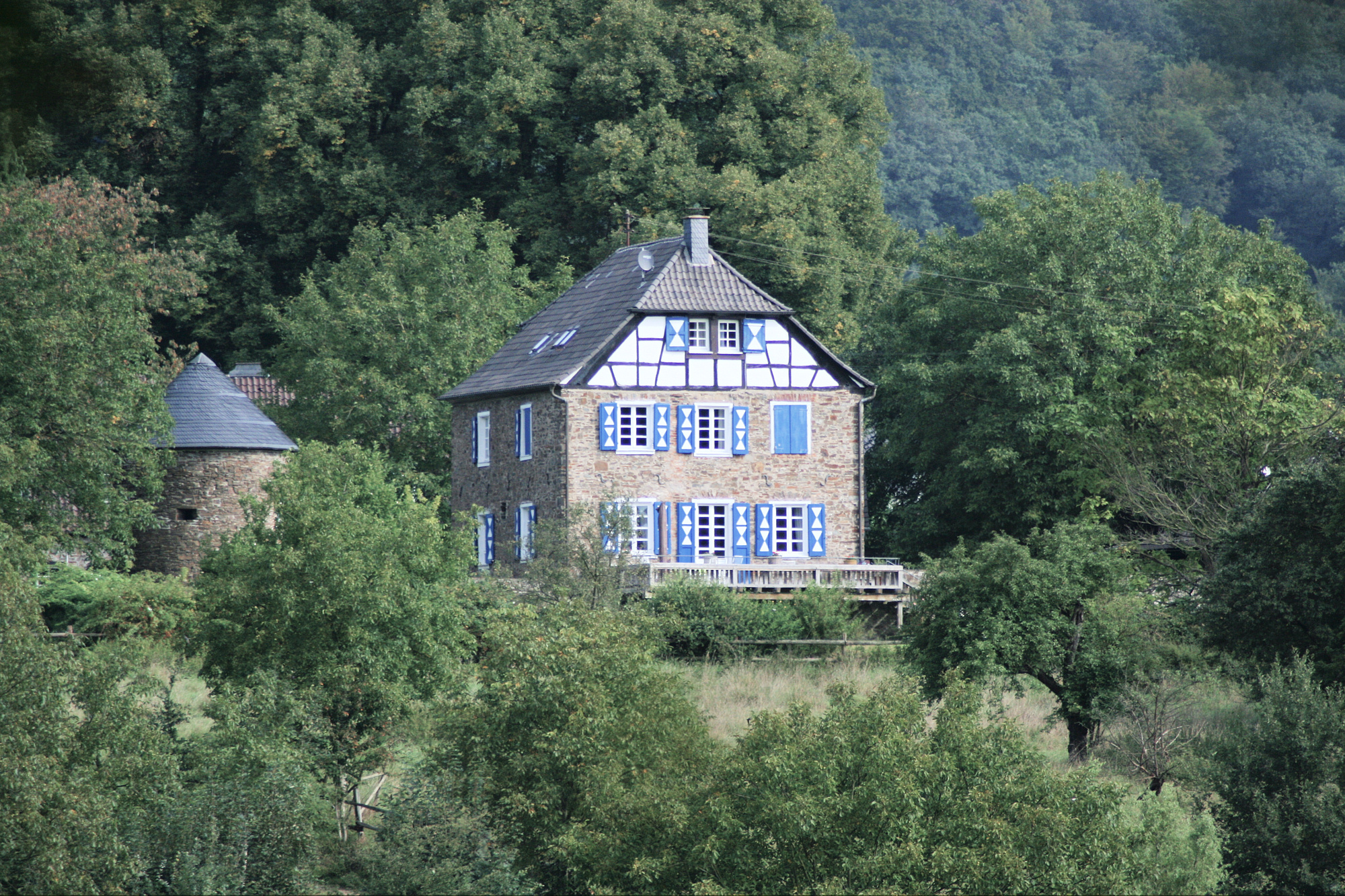 Burg Merten, Eitorf